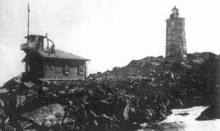 Орловско-Терский маяк и дом метеостанции. Фото 1926 г.